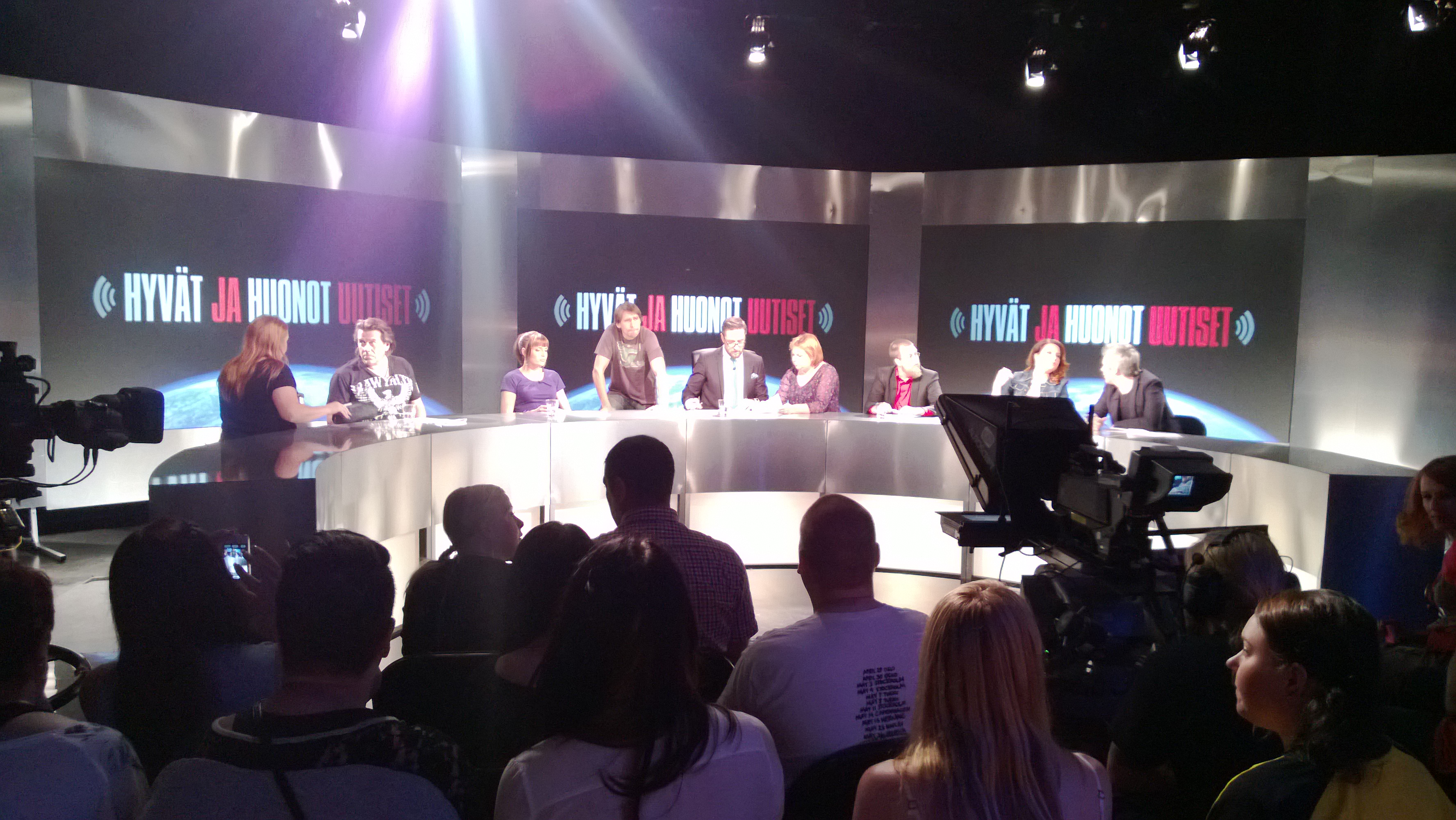 Hyvät ja Huonot Uutiset kolmannen kauden viimeinen lähetys keväällä 2013. Vieraana Pirjo Heikkilä. Kuva on otettu studioyleisön joukosta mainostauon aikana, jolloin kuvausryhmä ja maskeerajat antavat esiintyjille lisäohjeita.